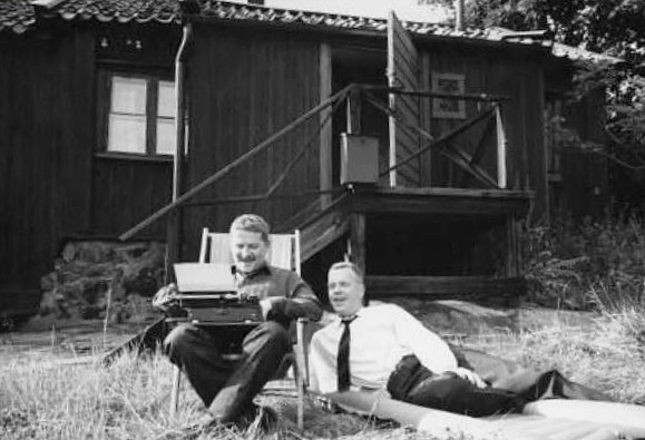 Hasse och Tage framför Svenska Ords skrivstuga